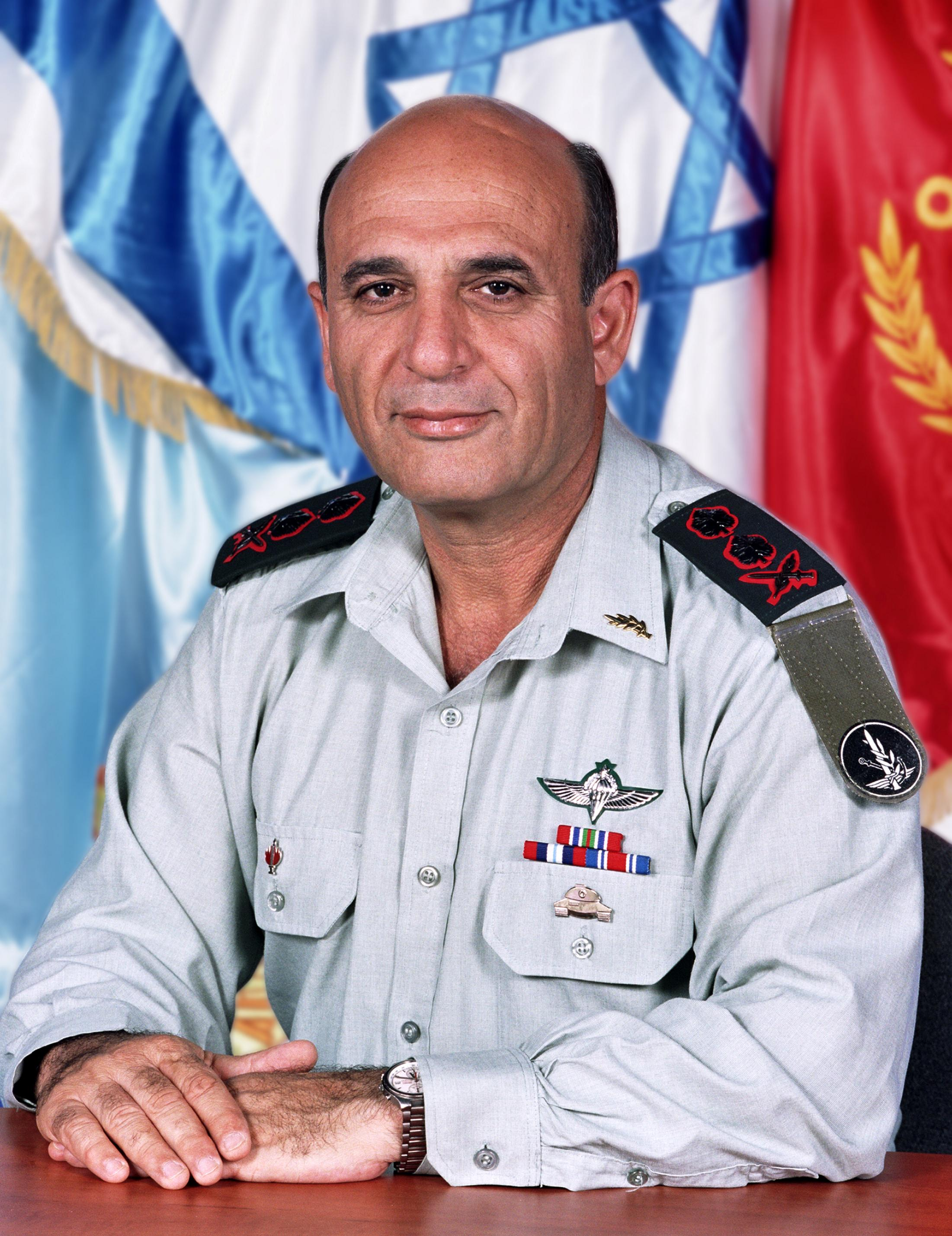 הרמטכ"ל רא"ל שאול מופז.